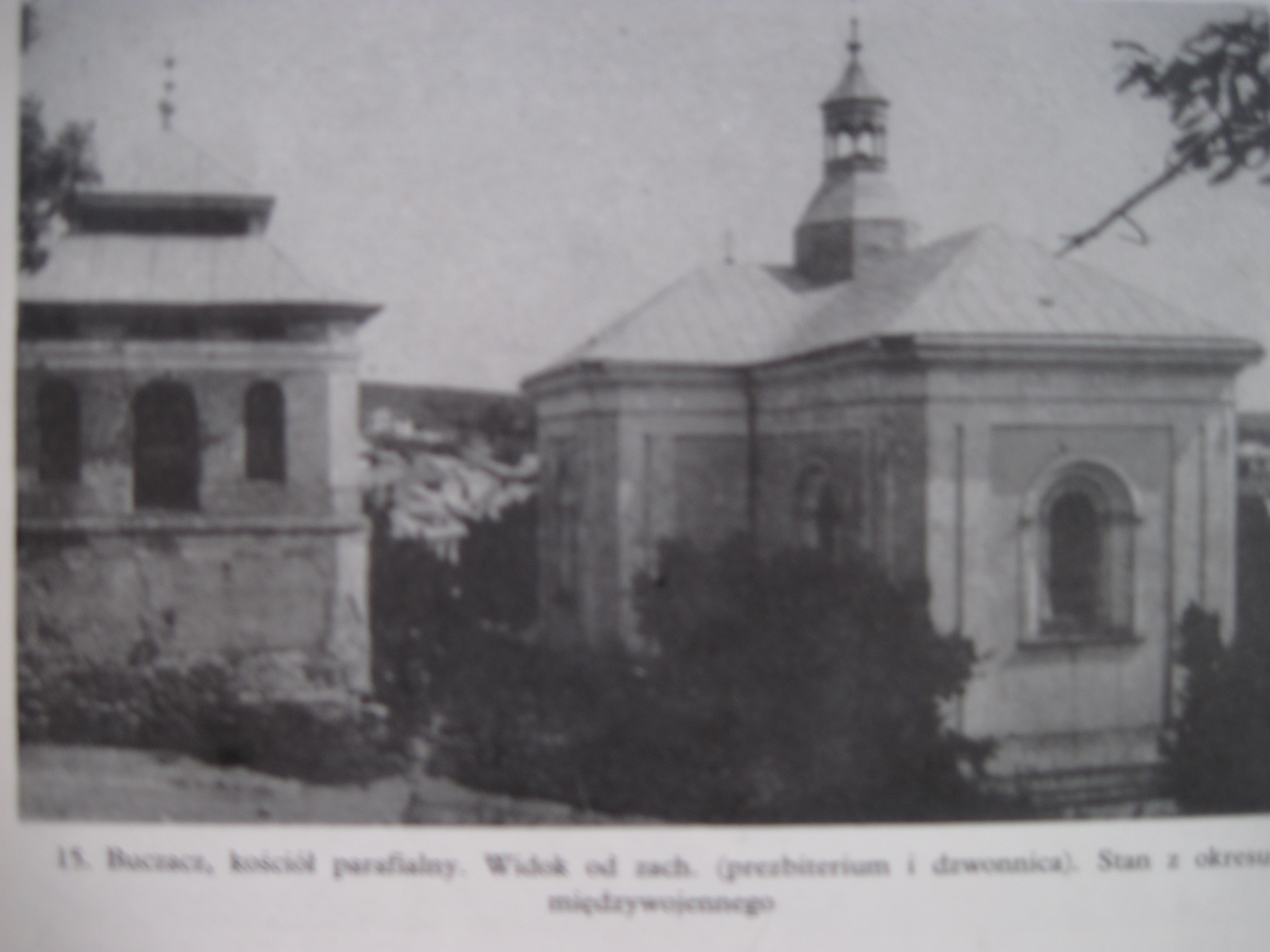 Бучач, зруйнована більшовиками дзвіниця костелу